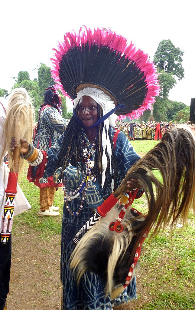 Femme "Mafo" Funérailles d'un chef bamiléké - Ouest Cameroun This is an image of Cultural Fashion or Adornment from Cameroon